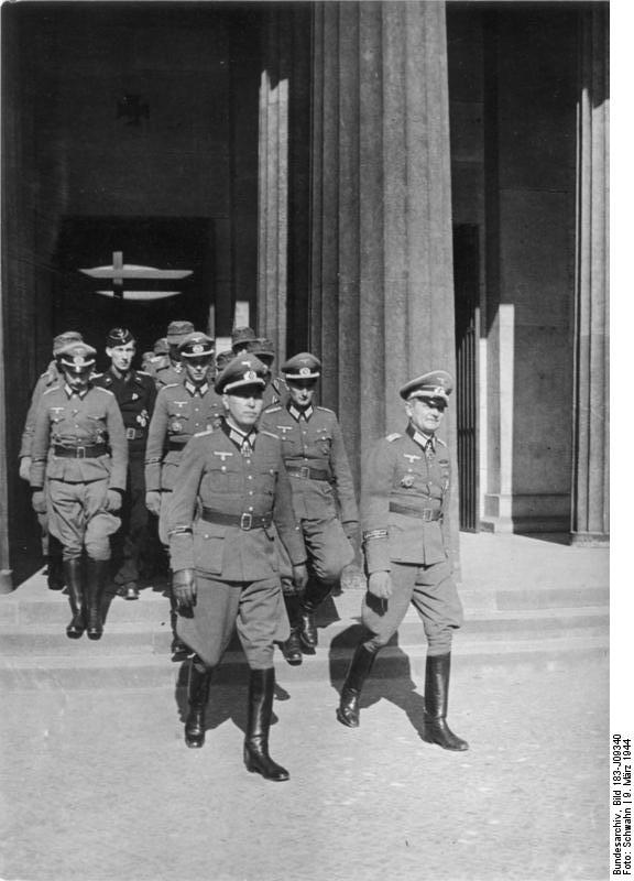 Frontabordnung der Division "Großdeutschland" in Berlin, Die zur Zeit in der Reichshauptstadt weilende Frontabordnung der Division "Grossdeutschland" ehrte die gefallenen Helden durch eine Kranzniederlegung am Ehrenmal Unter den Linden. Unser Bild zeigt: Die Abordnung, unter Führung von Eichenlaubträger Oberst Niemack (links) und Ritterkreutzträger + Gehrke, verlässt nach der Kranzniederlegung das Ehrenmal. + Oberstleutnant Scherl Bilderdienst (Schwahn) 09.03.1944